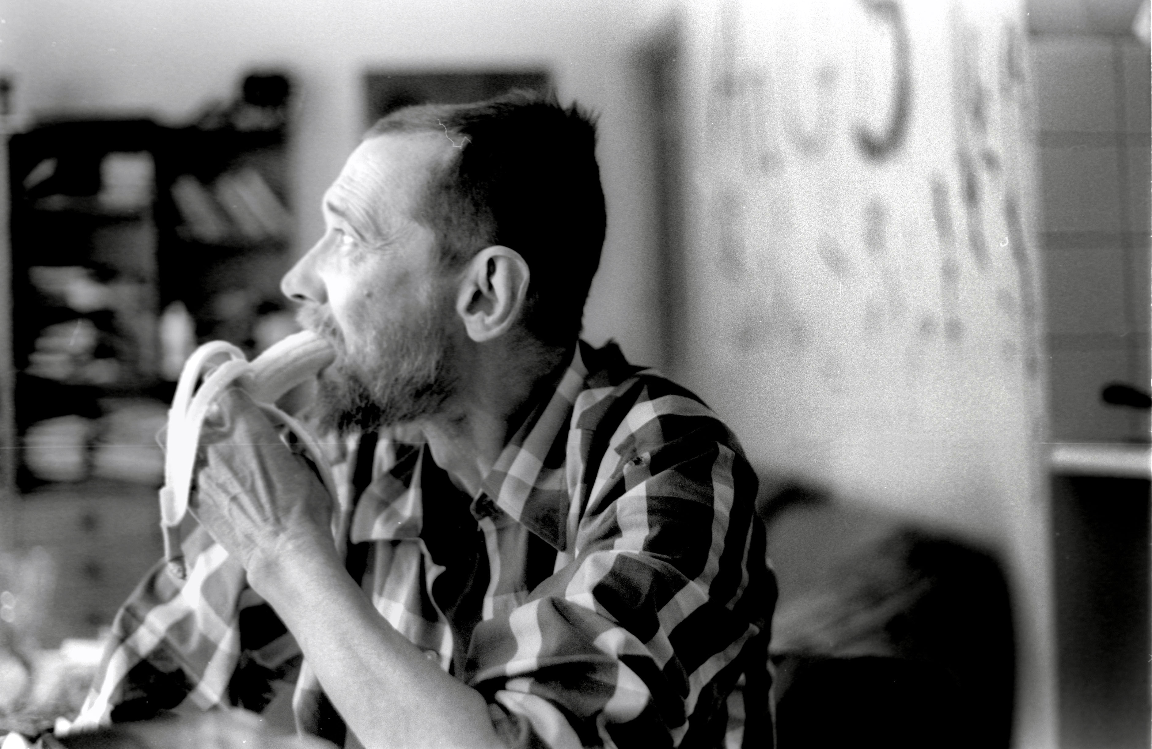 J.M.H. Berckmans in de Lange Batterijstraat 3, Antwerpen